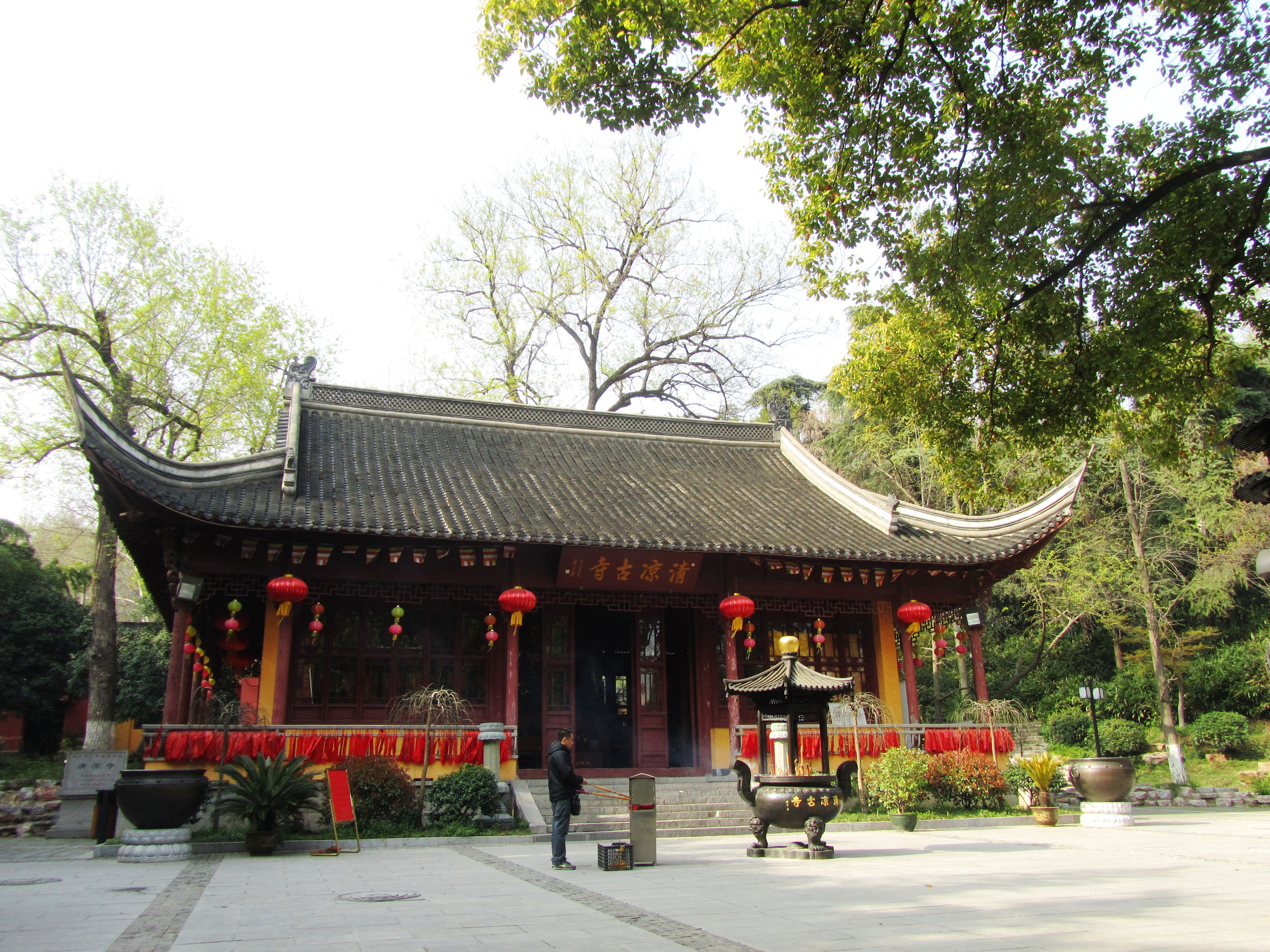 南京清凉山清凉禅寺，西南侧看。